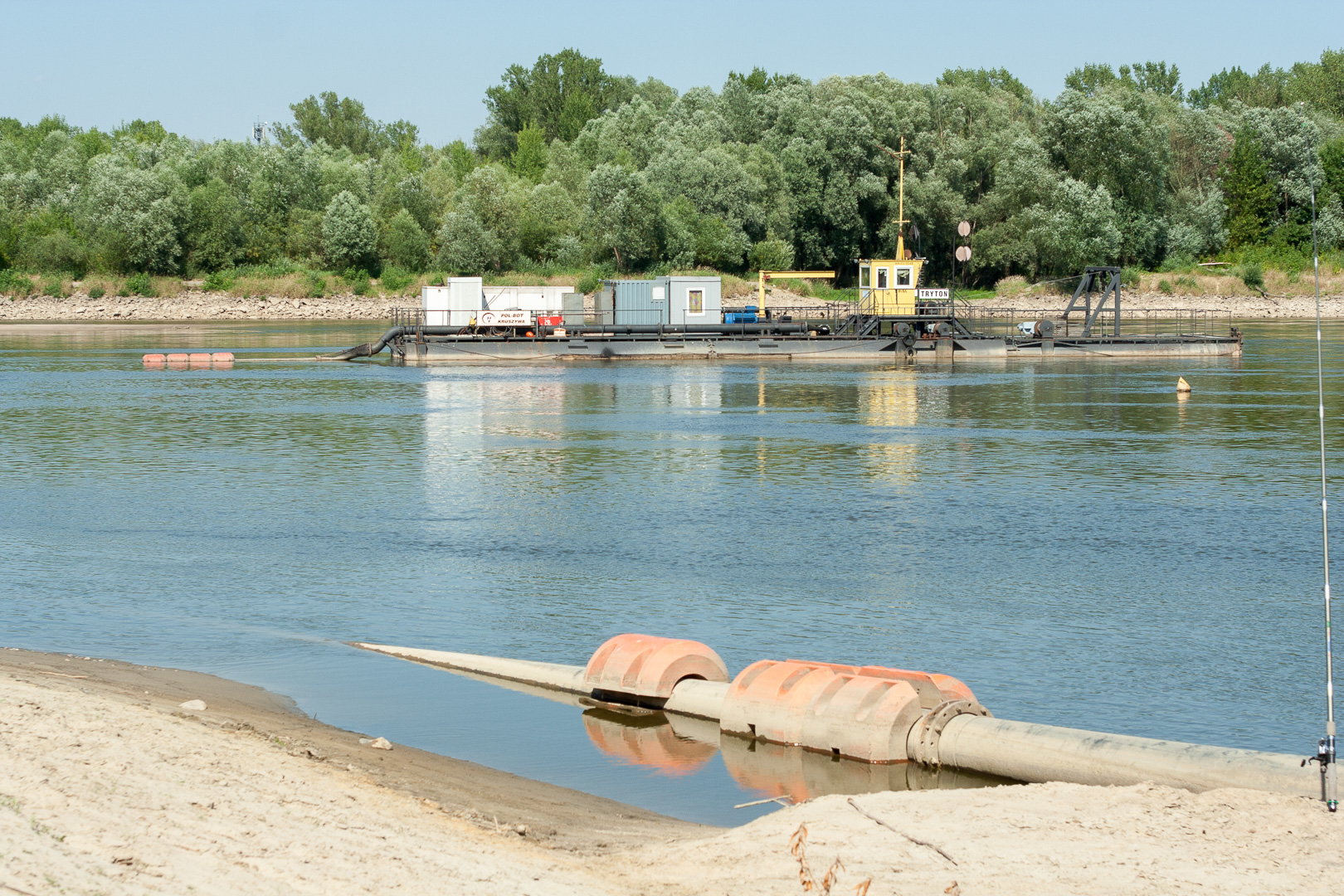 Pogłębiarka ssąco - refulacyjna (tzw. piaskarka) „Tryton” przy piaskarni Siekierki na Wiśle w Warszawie. This is a photography of Natura 2000 protected area with ID PLB140004